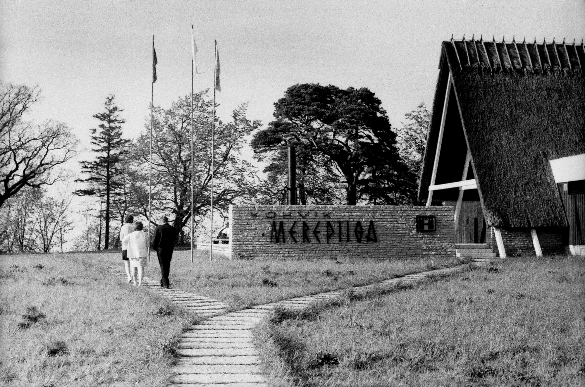 Merepiiga kohviku projekteeris Voldemar Herkel, valmis 1966. aastal.